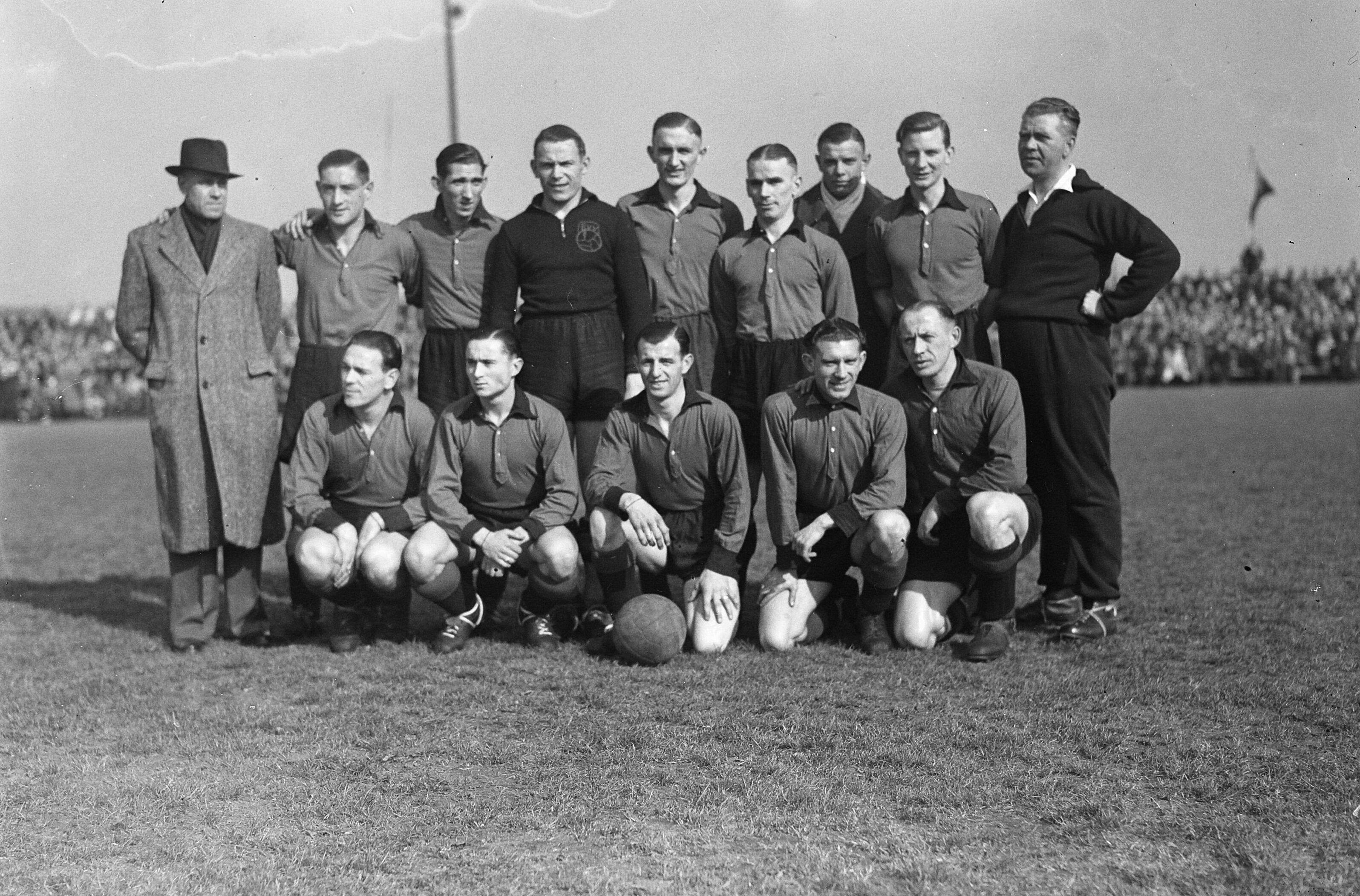 Collectie / Archief : Fotocollectie Anefo Reportage / Serie : [ onbekend ] Beschrijving : BVV-Juliana. Elftal BVV Locatie : 's-Hertogenbosch Trefwoorden : groepsportretten, voetbal Fotograaf : Noske, J.D. / Anefo Auteursrechthebbende : Nationaal Archief Materiaalsoort : Glasnegatief Nummer archiefinventaris : bekijk toegang 2.24.01.09 Bestanddeelnummer : 902-6194